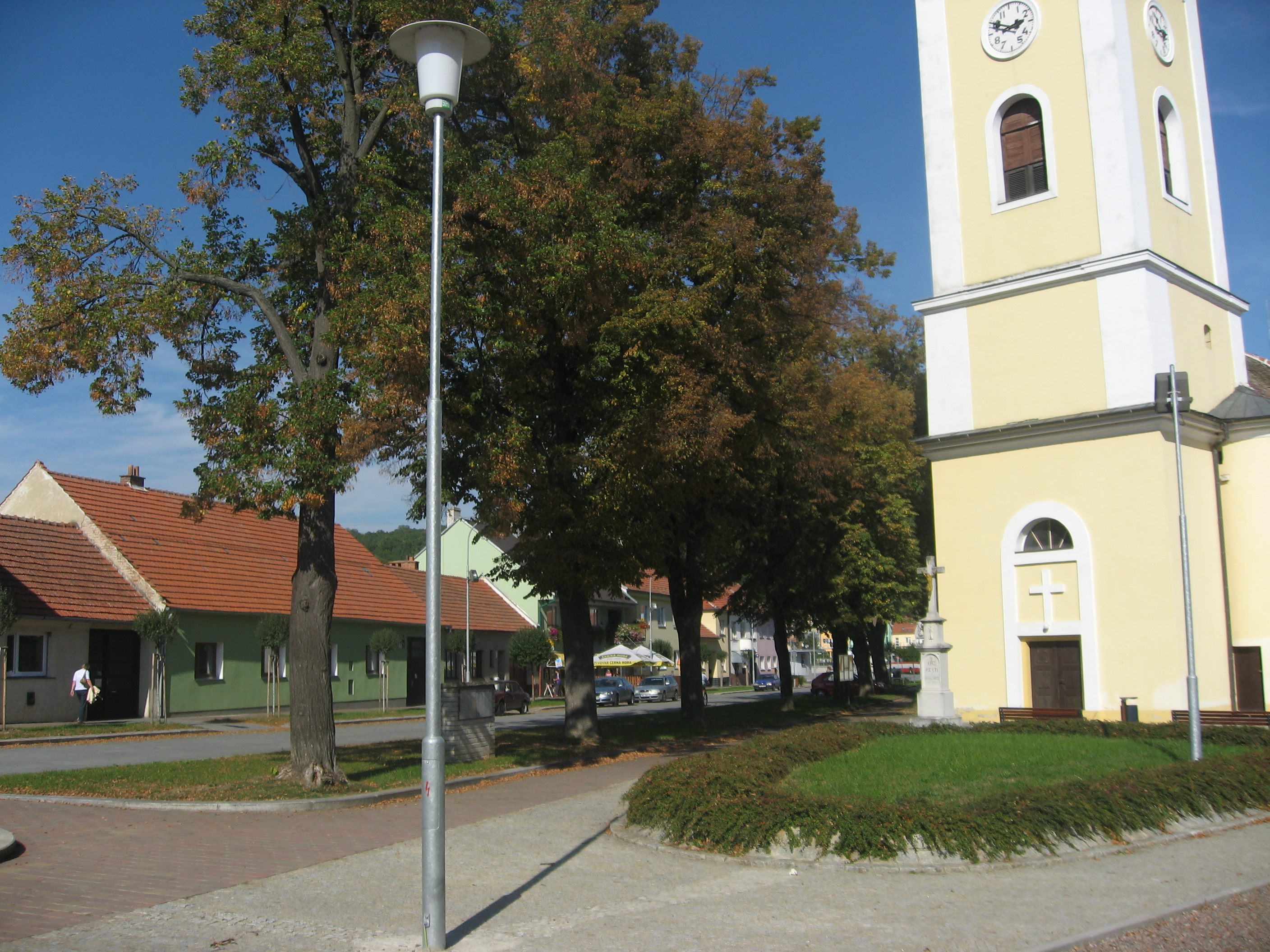 Náměstí 28. dubna, Brno-Bystrc